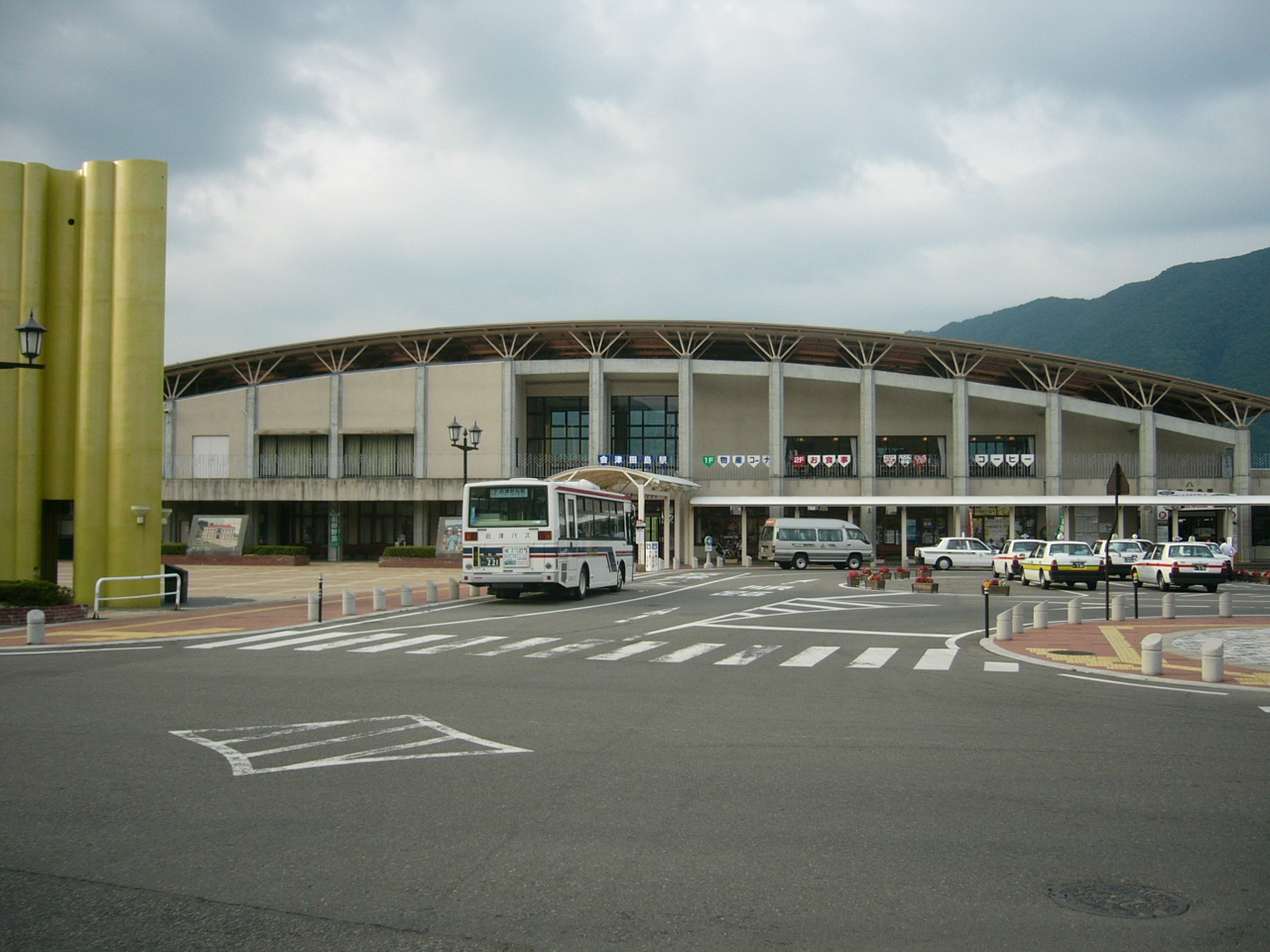 Aizutajima Station